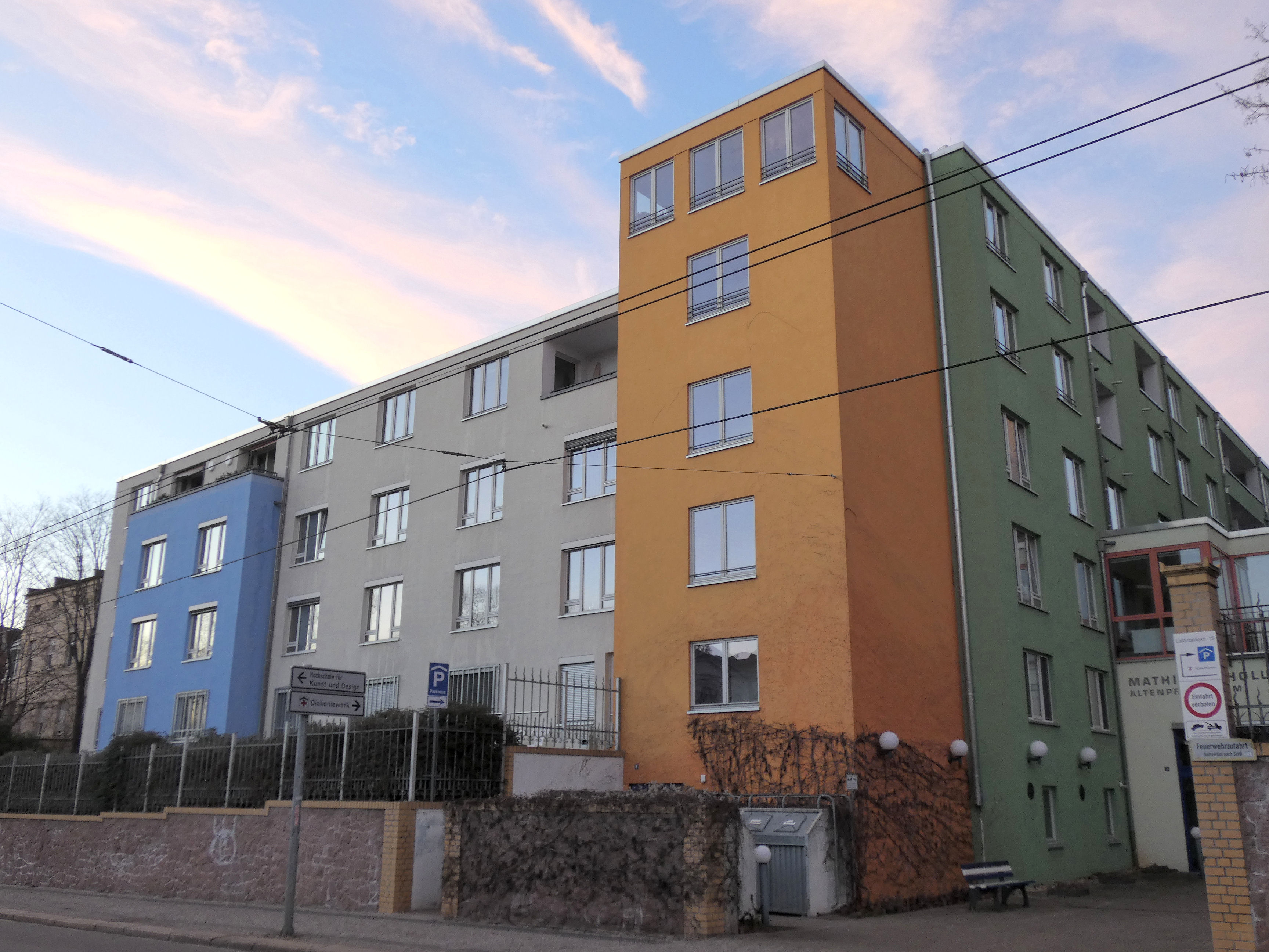 Mathilde-Tholuck-Haus im Diakoniewerk Halle, Altenpflegeheim, Mühlweg, Halle (Saale)